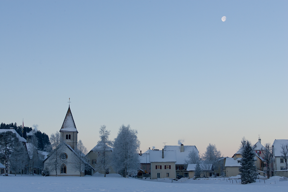 La Brévine bei etwa minus 20 Grad Celsius vor Sonnenaufgang